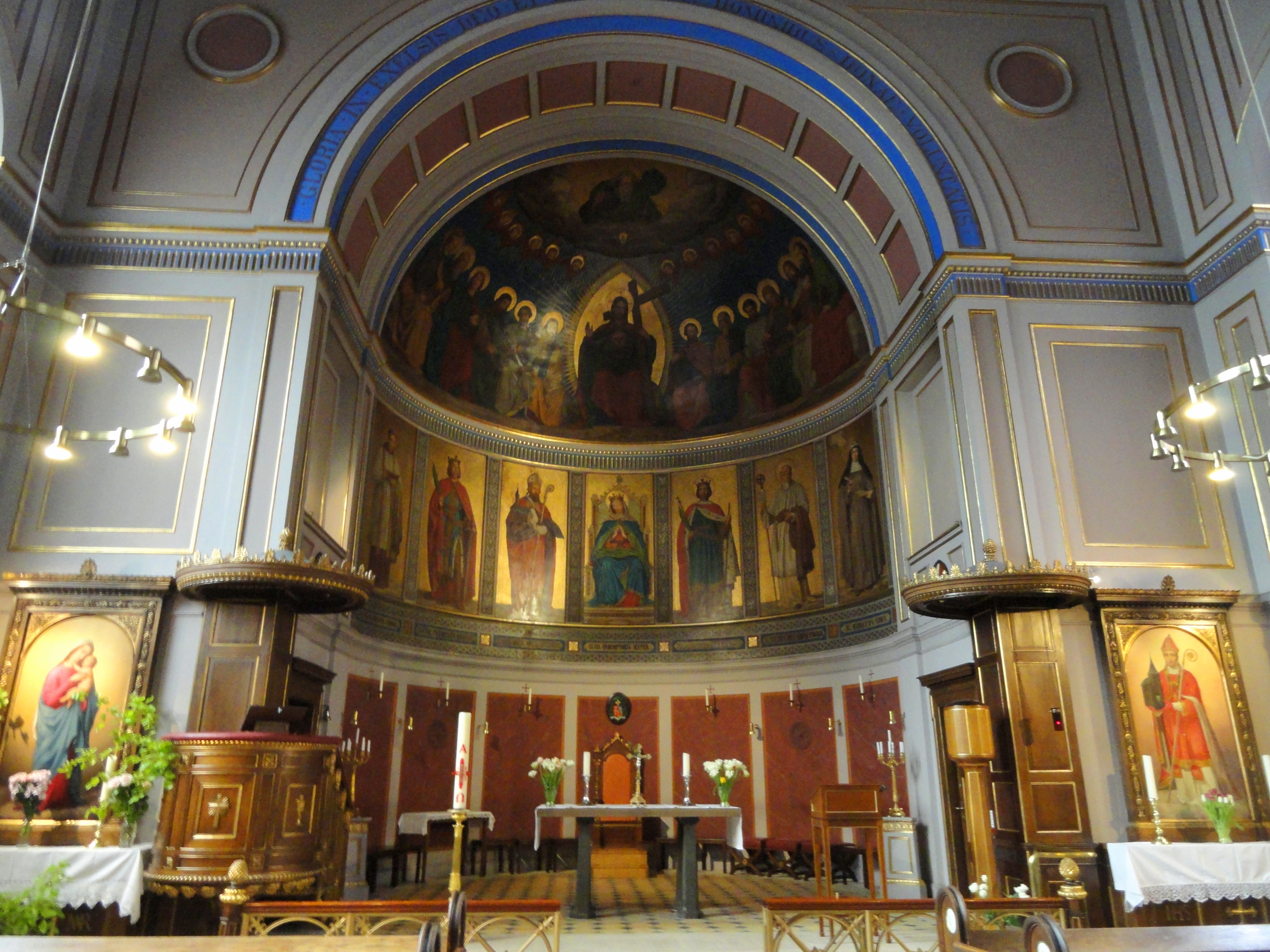 Sankt Ansgar Kirke, Copenhagen, Denmark.